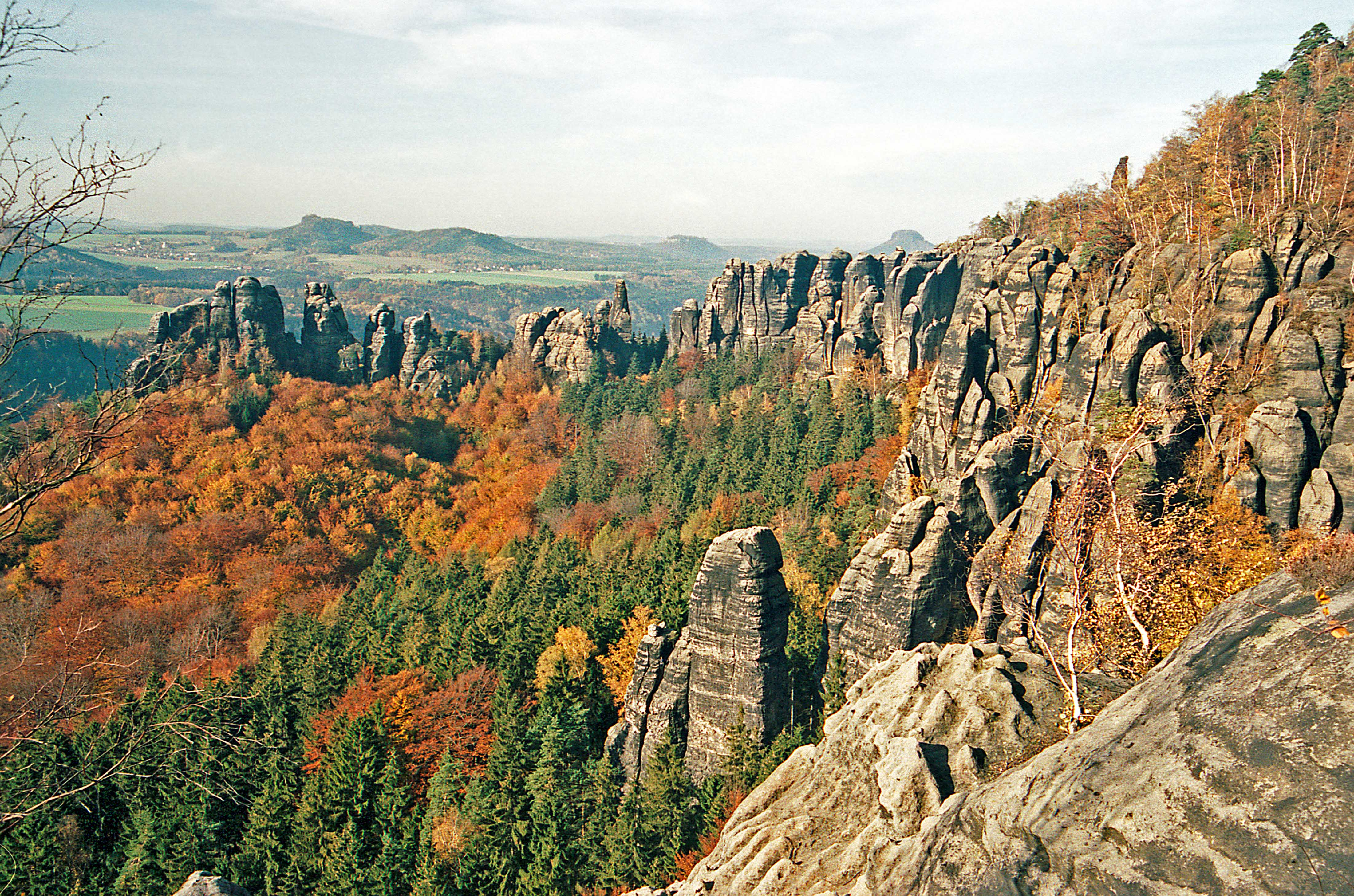 Schrammsteine in Saxony Switzerland Autor: Prazak date: 10. 2004